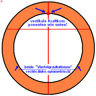 Im Innenraum einer Kugelschale herrscht Schwerelosigkeit, da das Schwerepotential konstant ist. Diese Tatsache wird durch Unterteilung in symmetrische Schalenteile verständlich: die rechts-links-Symmetrie lässt die Horizontalkräfte verschwinden, und die unterschiedliche Entfernung der Massen auch die vertikale Schwerkraftkomponente.